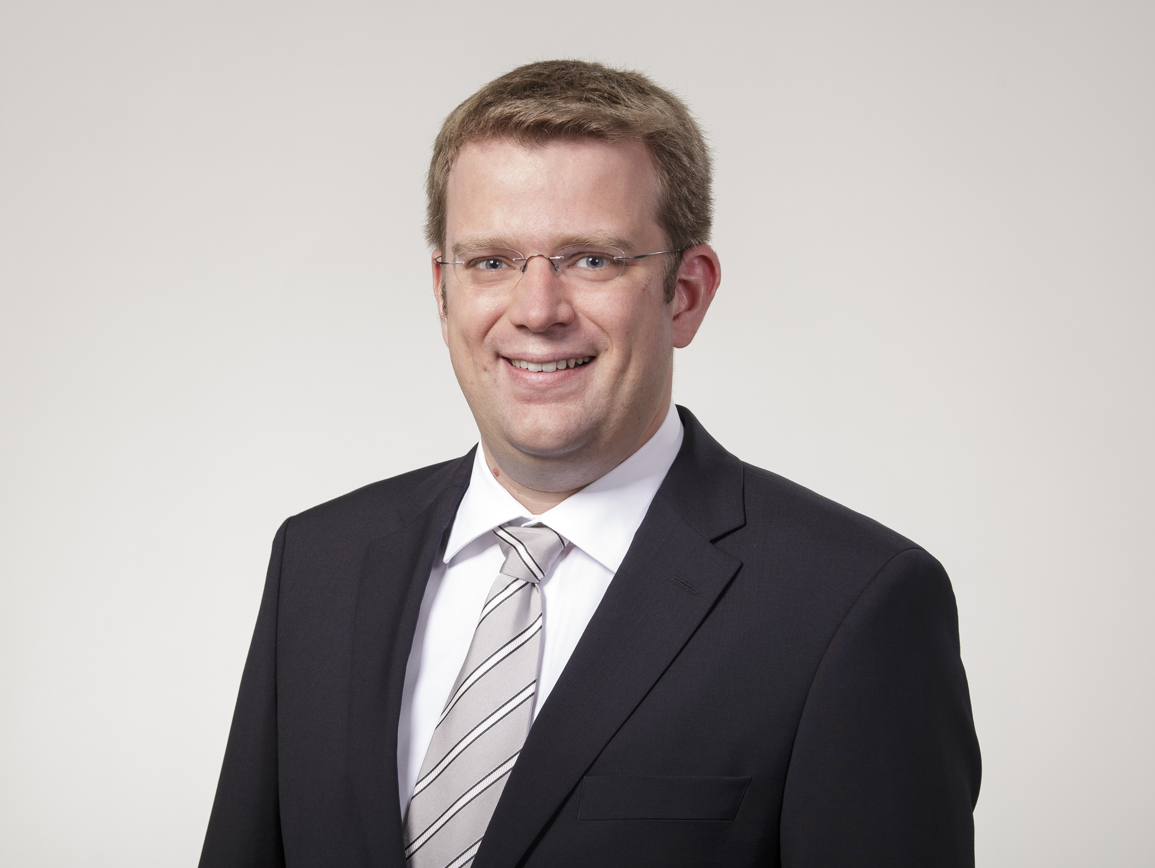 Reinhard Brandl, MdB.